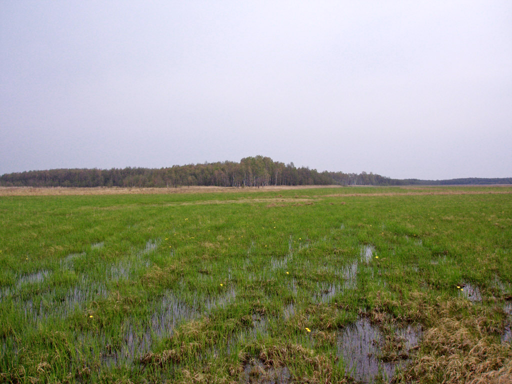 Posada, Basen dolny Biebrzy